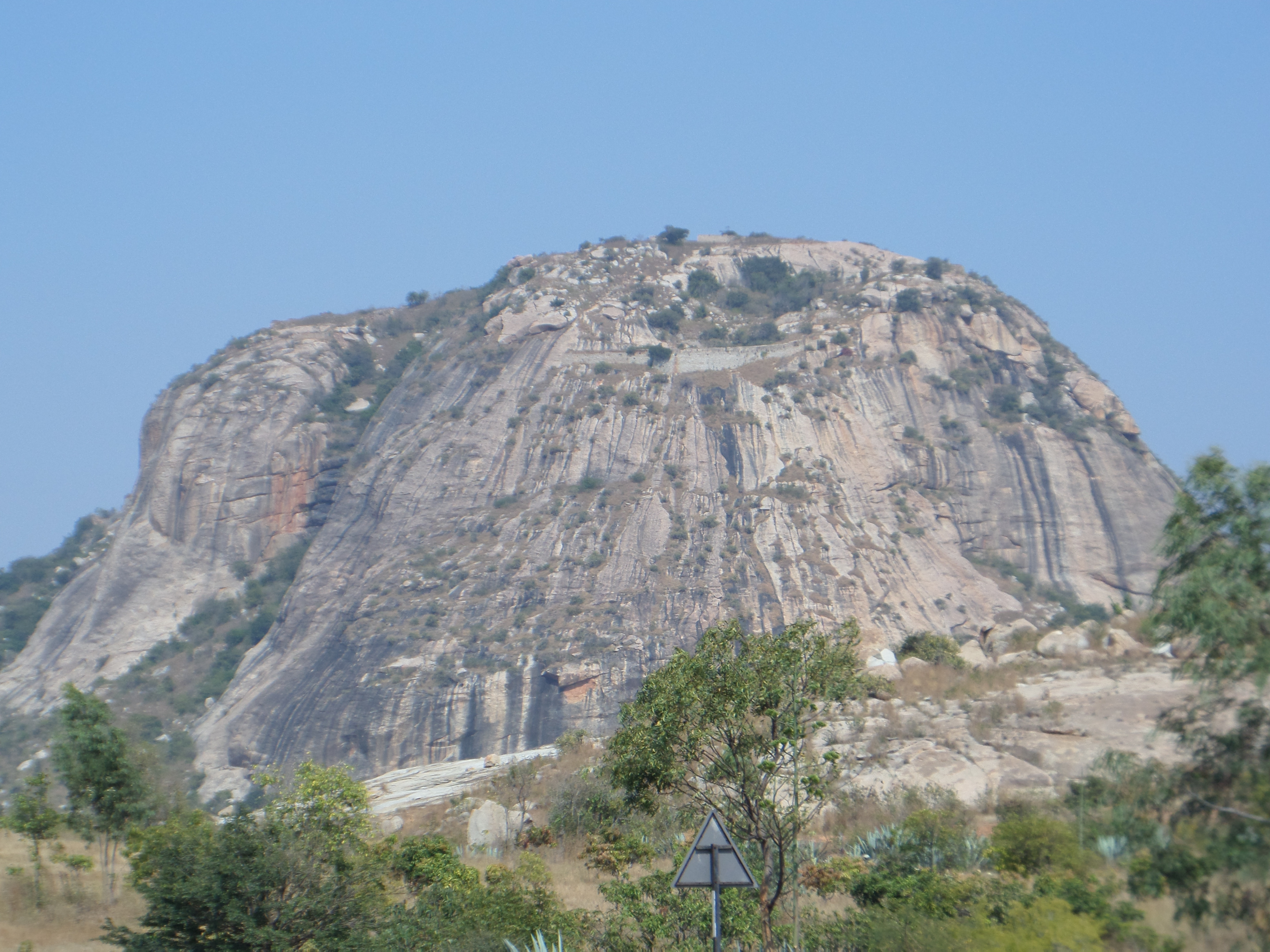 GURRAM KONDA FORT! KADAPA AP